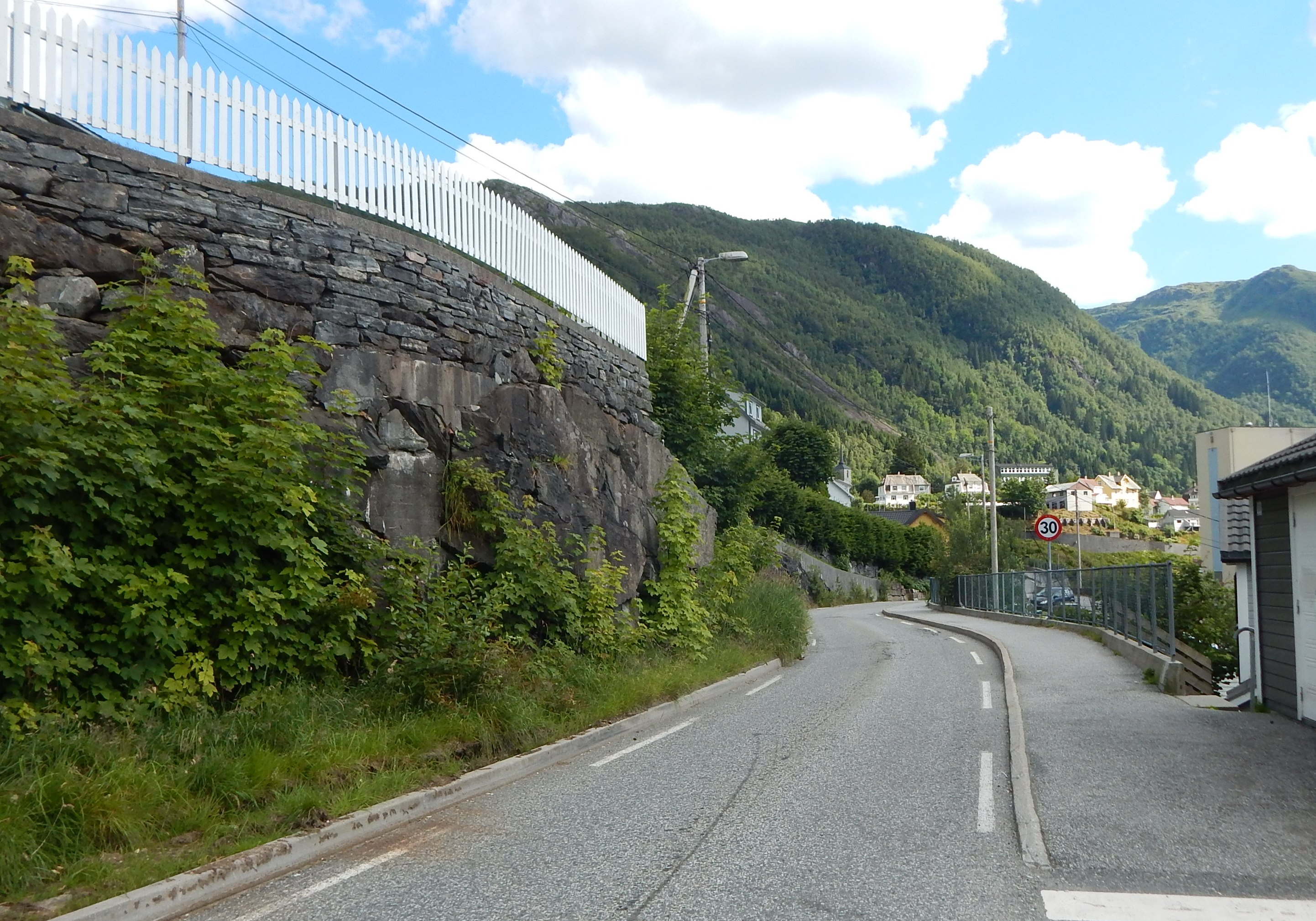 Trollkjelsvegen (fylkesvei 343) like ved Vaksdal stasjon